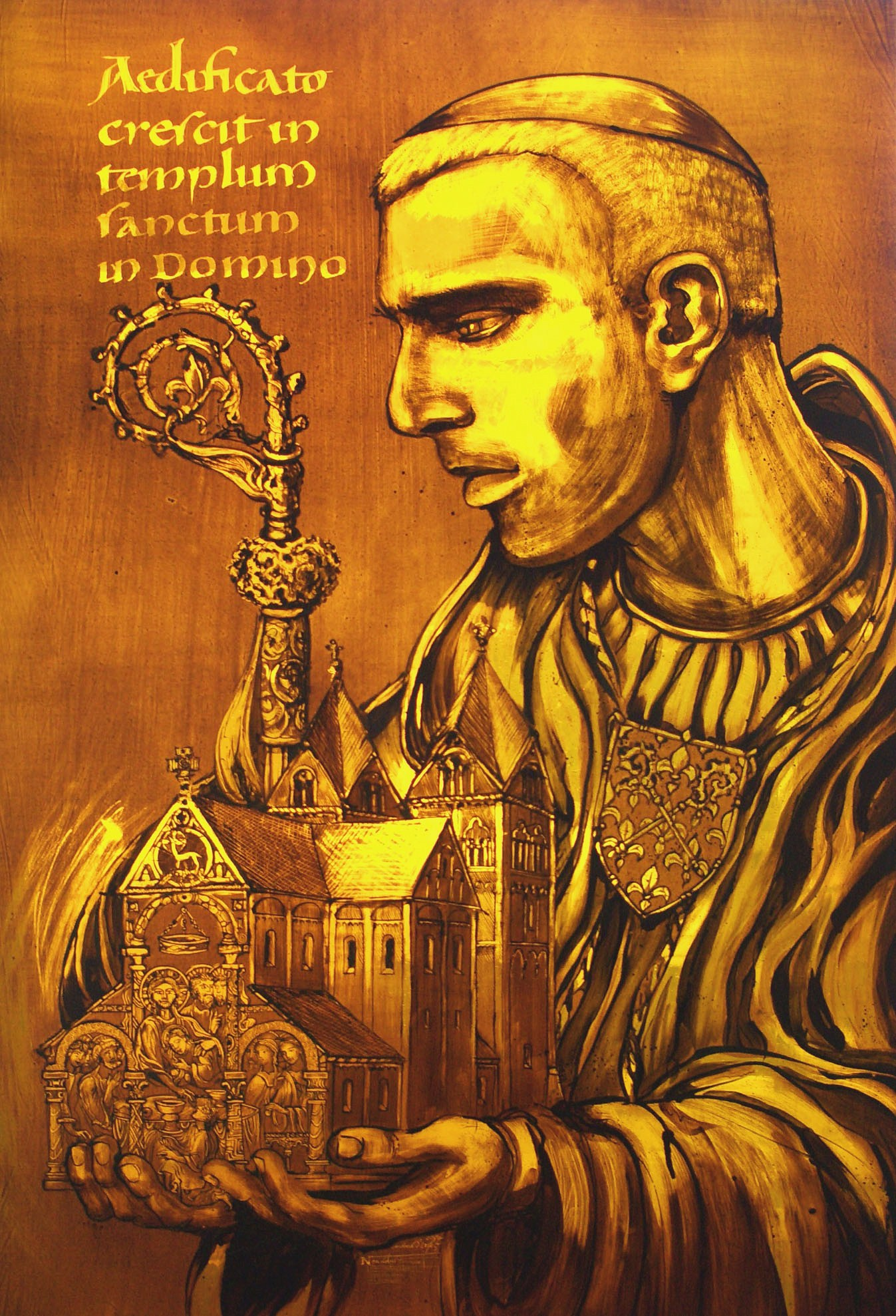 Hugo de Fosses, Curia Generalizia dei Premostratensi, Viale Giotto 27, Roma. Foto: A. d´Orfey, Kunst im Licht, München, 2010